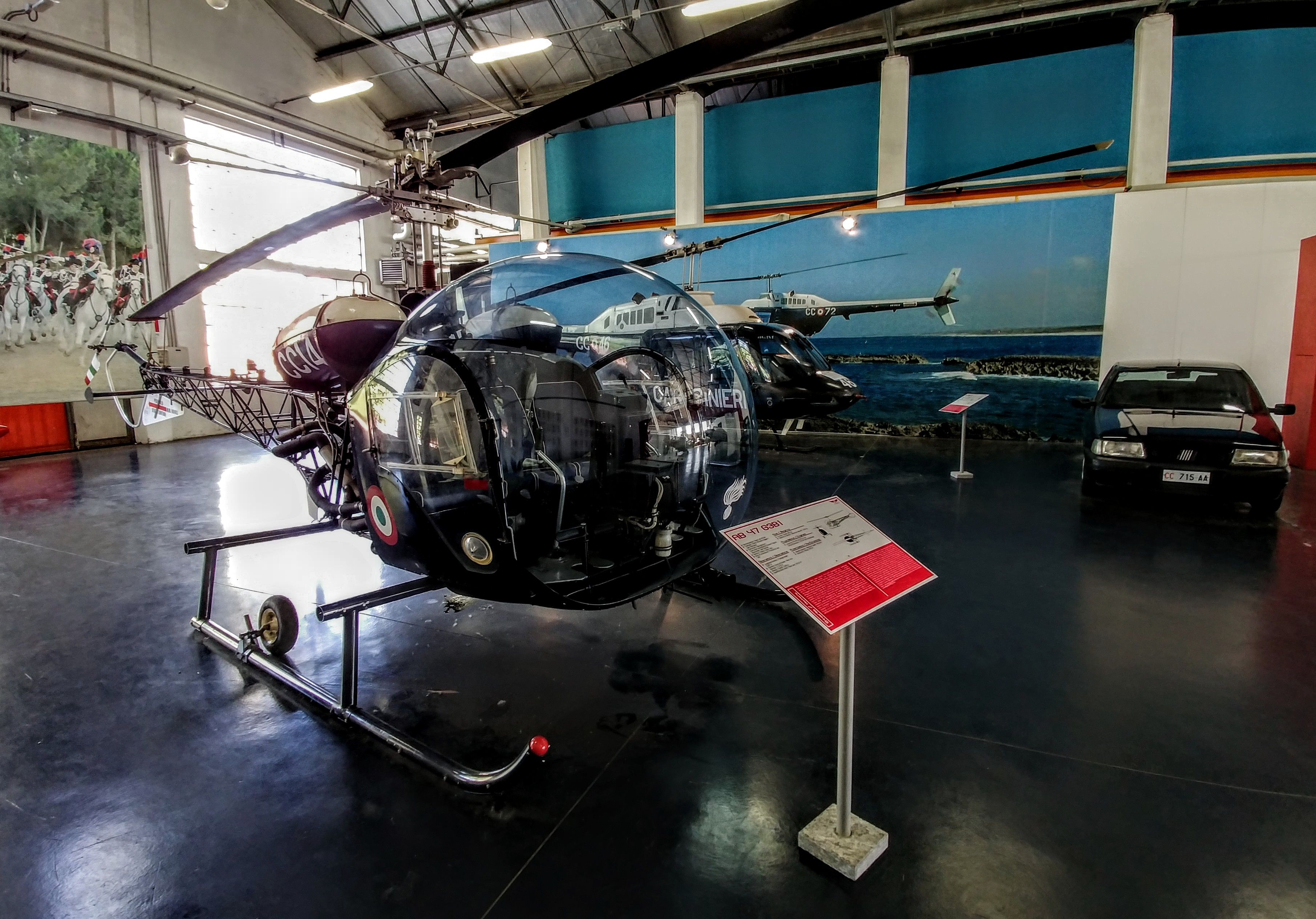 L'AB 47 G3B1 di Volandia, in forza all'Arma dei carabinieri dal 1966 al 1977